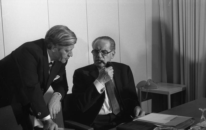 Sitzung des SPD-Präsidiums in der Friedrich-Ebert-Stiftung, Bonn (links: Helmut Schmidt, rechts: Herbert Wehner)